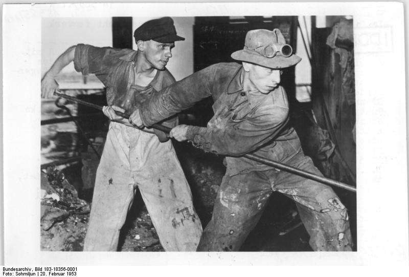 Hüttenarbeiter am Hochofen Zentralbild Schmiljun Kno-Nhs. 888,Av. 20.2.1953 Im Eisenwerk Calbe West, dem ersten Niederschachtofenwerk der Deutschen Demokratischen Republik. Das Niederschachtofenwerk wird im 1. Fünjahrplan der DDR mit 25 Öfen fertiggestellt sein und einen wesentlichen Teil des Roheisenbedarfs in unserer Republik decken. Bisher brac